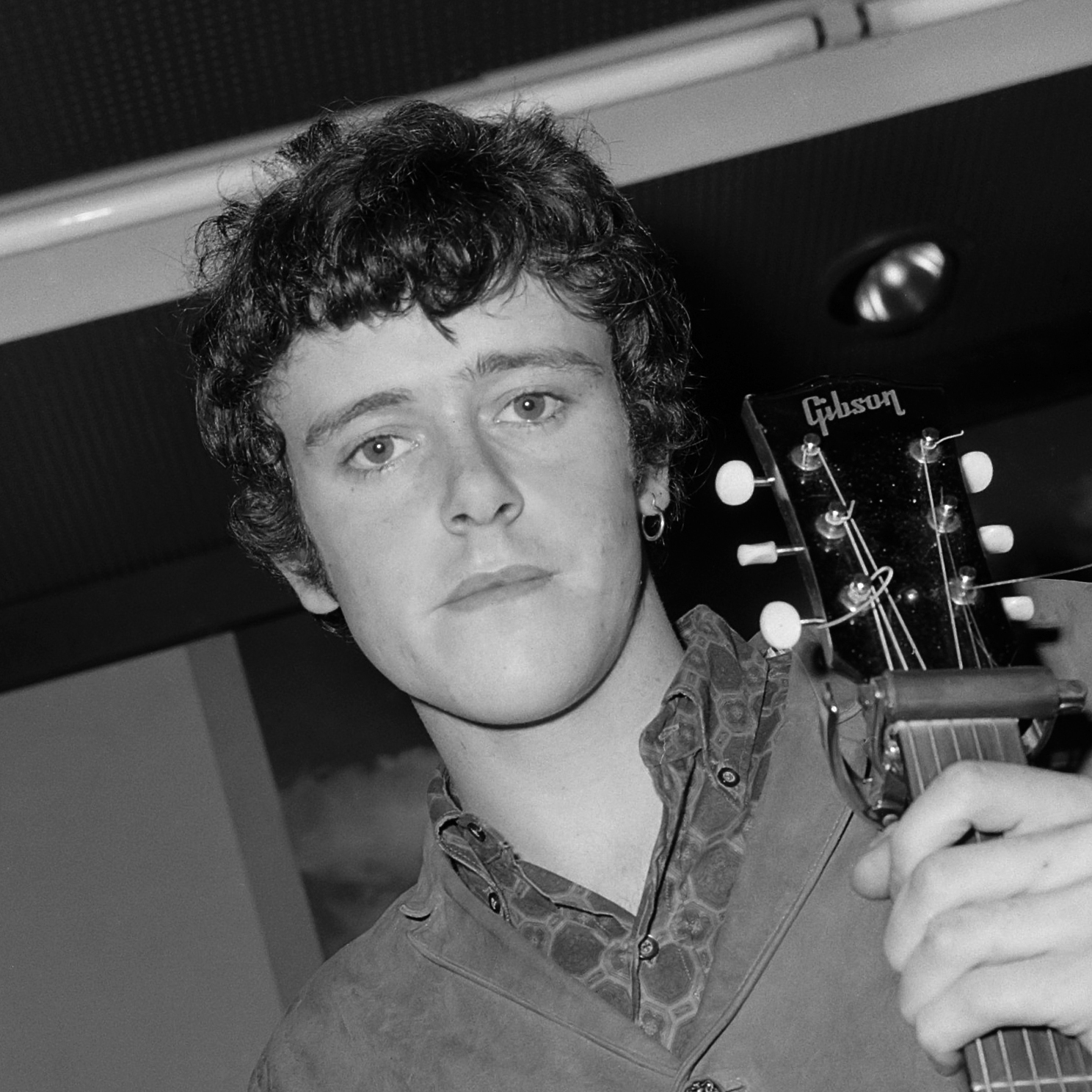 Aankomst Donovan Leitch (zanger volksliedjes) op Schiphol 12 juli 1965